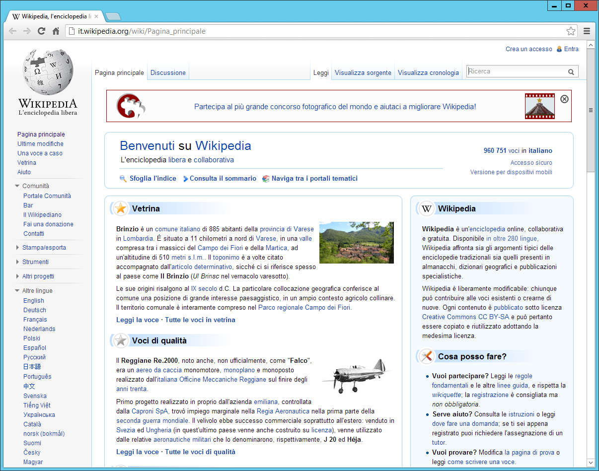 Interfaccia desktop di Google Chrome 22 su Microsoft Windows 8